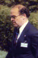 Derek Burney